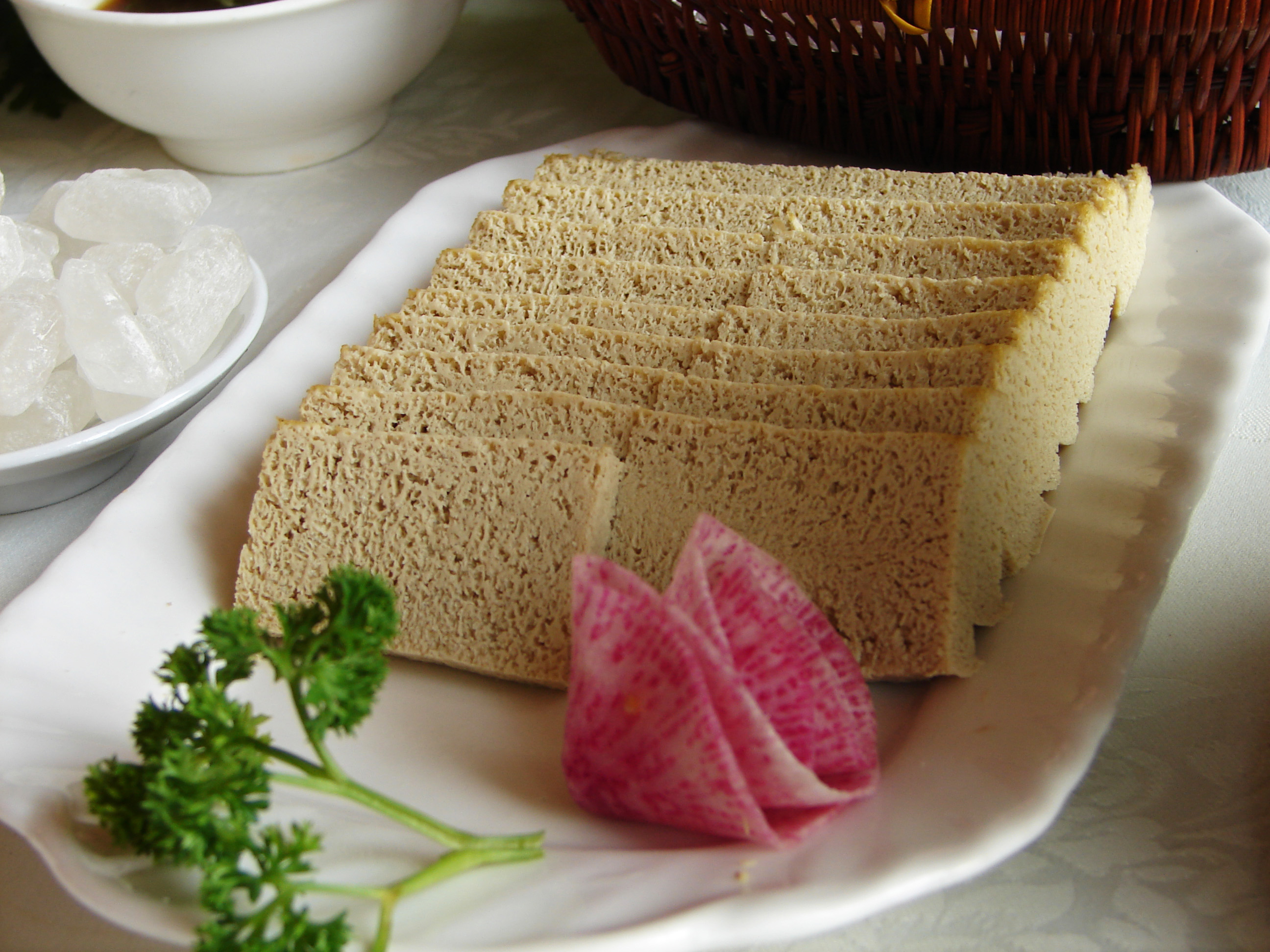 Dong Dou Fu; tofu.